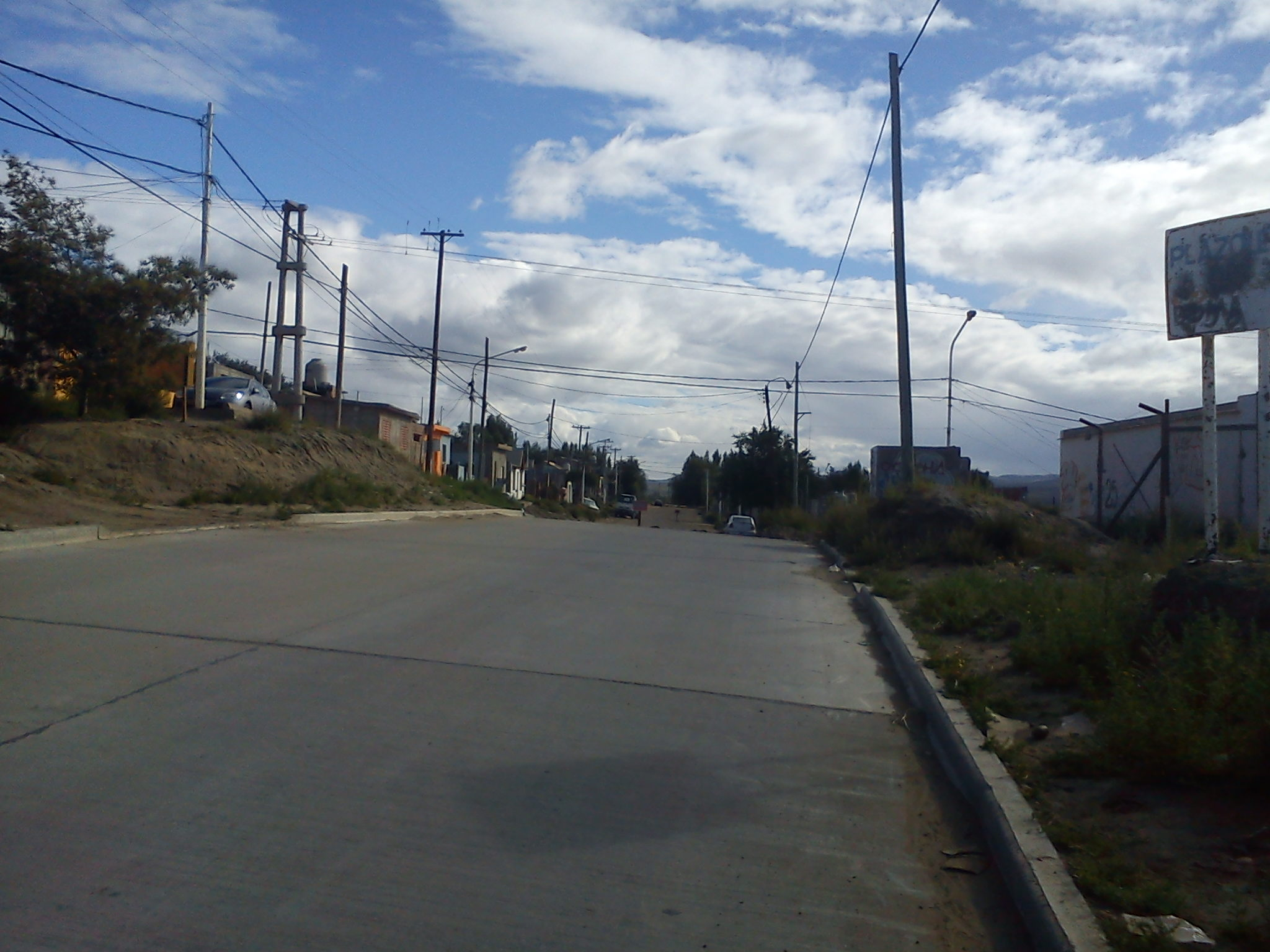 Calle del 25